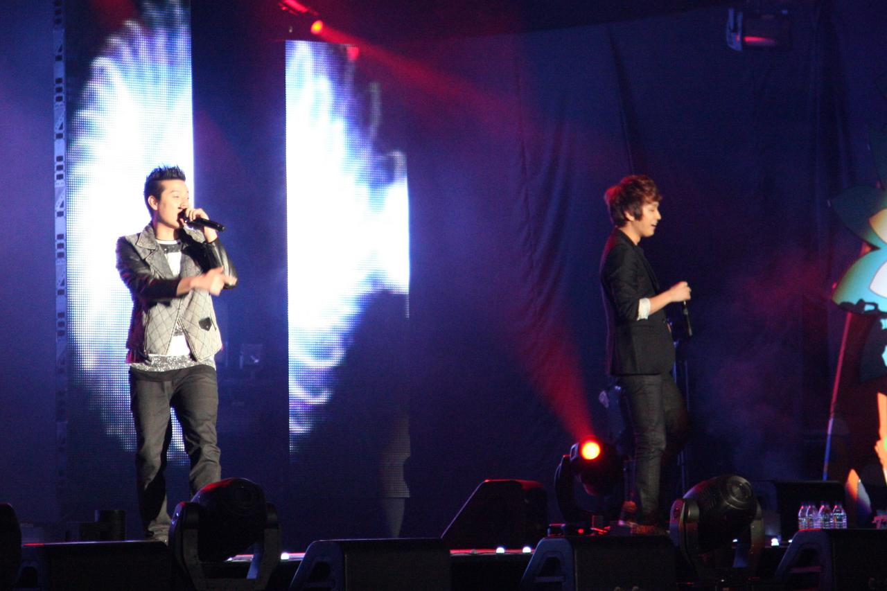 싸이월드 페스티벌